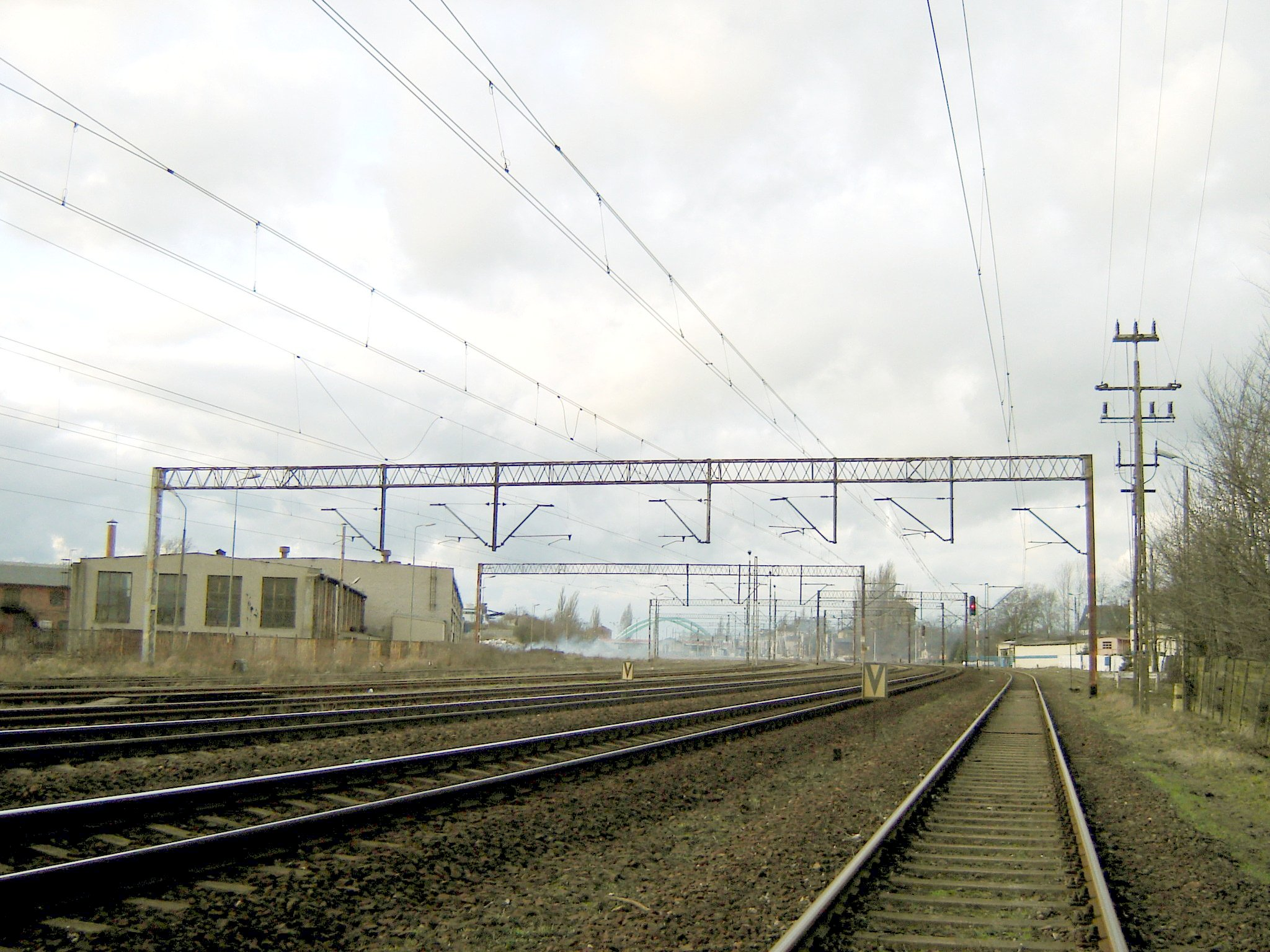 Choszczno - stacja kolejowa.